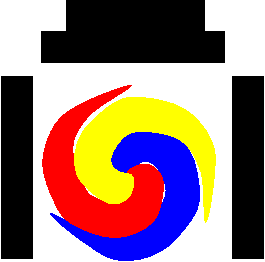 大韓民國首爾特別市鍾路區舊區徽，由石添小草 04:25 2005年8月10日 (UTC)於04:25 2005年8月10日 (UTC)製作。源文件：